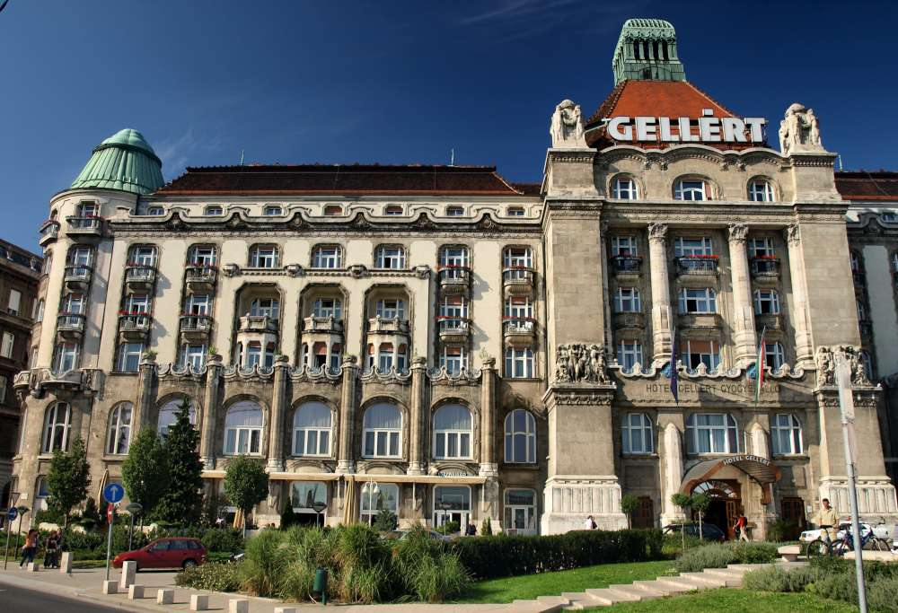 Gellért Szálló